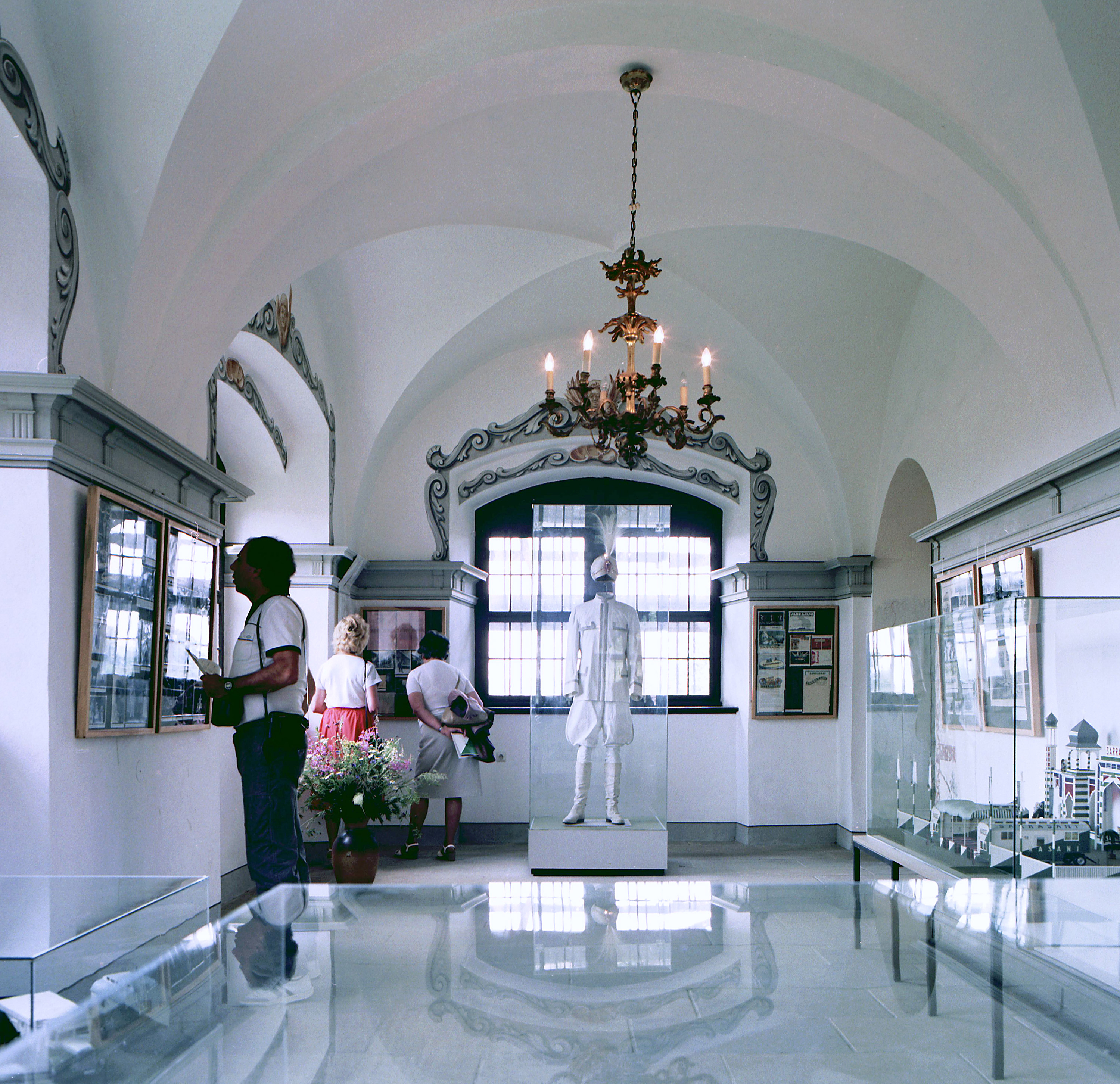 11.07.1987 DDR 8122 [01445] Radebeul-Hoflößnitz, Knohllweg 37 (GMP: 51.111539,13.662244): Schloß Hoflößnitz 1650). Renaissancebau von 1650, von Ezechiel Eckhardt als 'Berg- und Lusthaus' erbaut. Tafelstube im Erdgeschoß. Hier eine Ausstellung über den Zirkus Sarrasani. [R19870711A06.jpg]19870711700NR.JPG(c)Blobelt